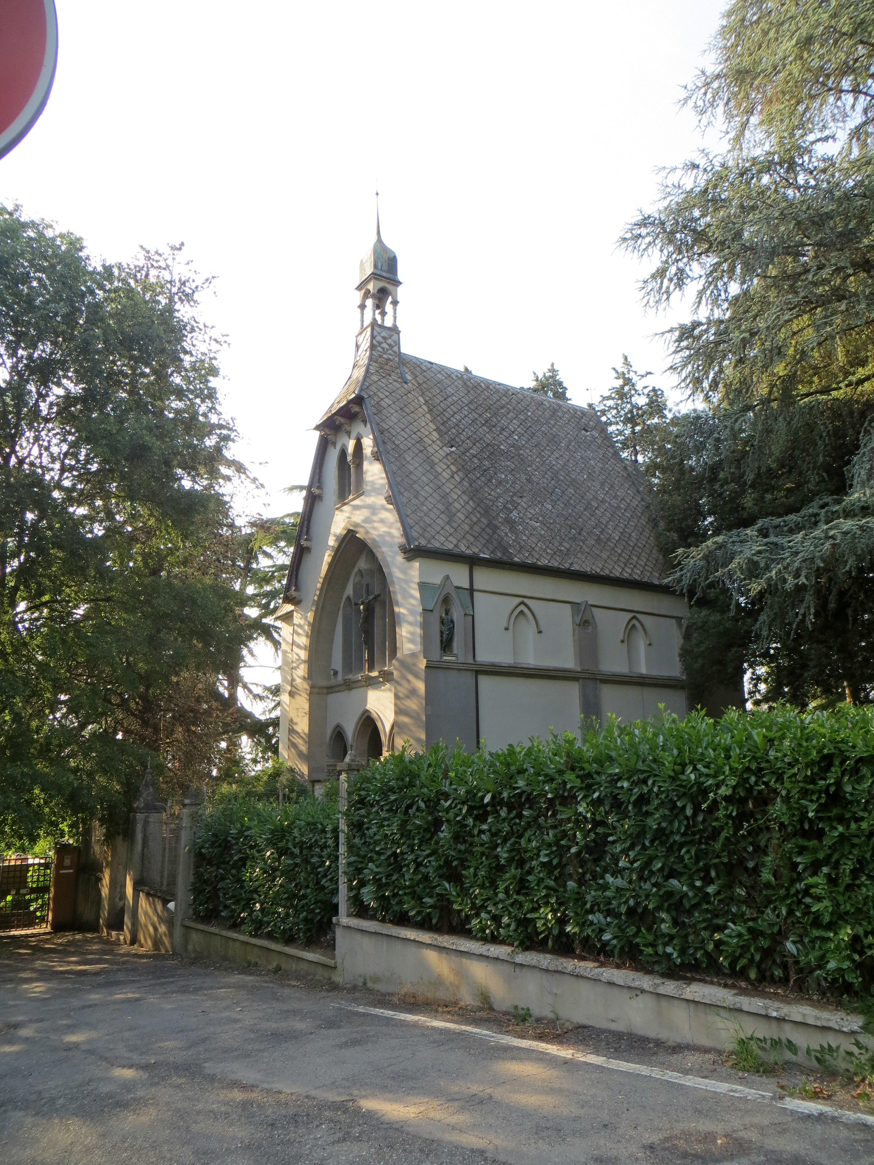 Oratorio di San Giulio (Monticelli Terme, Montechiarugolo) - facciata